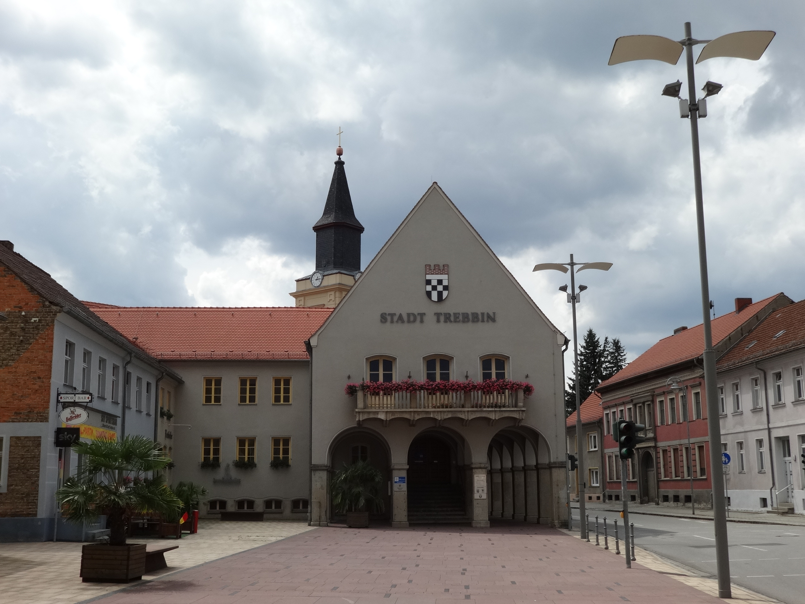 Rathaus in Trebbin, eine Stadt im Landkreis Teltow-Fläming, Brandenburg